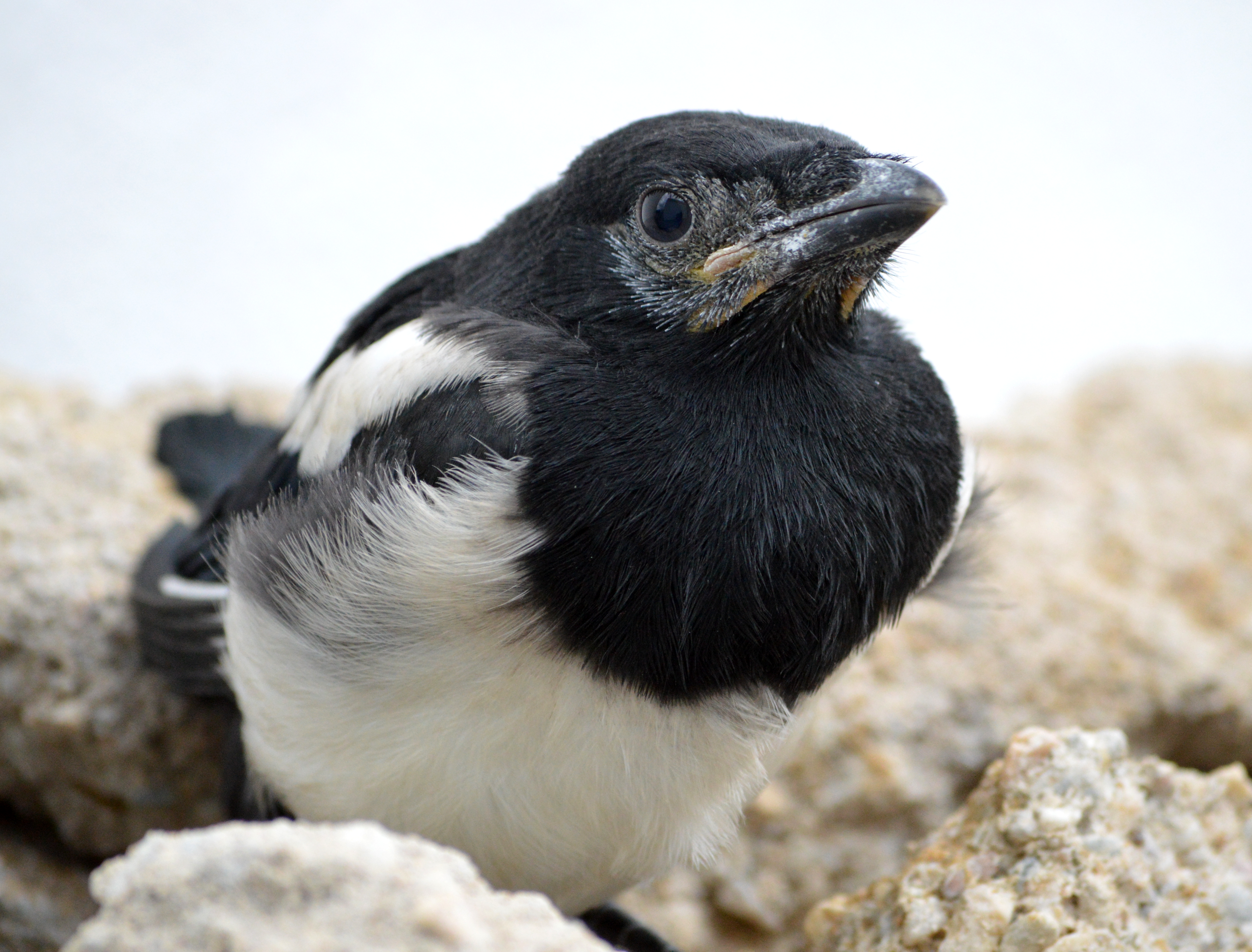 Eine junge Elster vor den ersten Flugversuchen. Langerwehe, Kreis Düren, Nordrhein-Westfalen, Deutschland